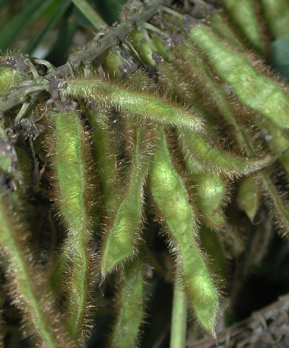 Kudzu seedpods